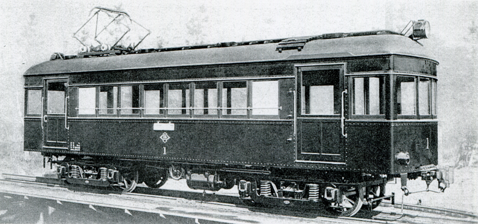 琴平急行電鉄デ1形1号車。製造元の日本車輌製造本店にて落成時に撮影された形式写真。